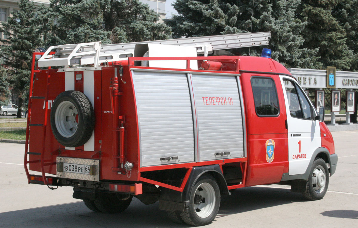 Пожарный автомобиль на базе Газели. Вид сзади. Саратов